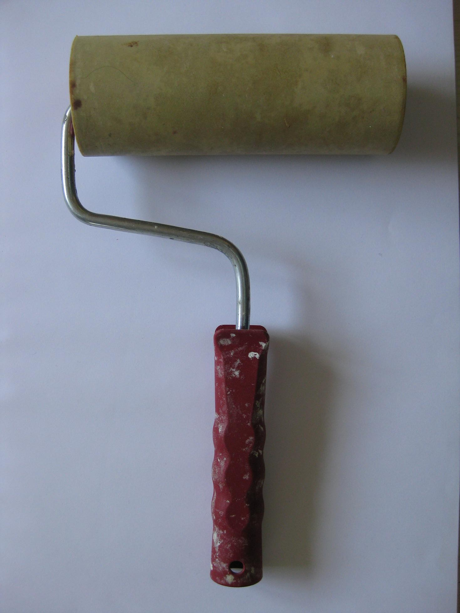 Tapezierrolle